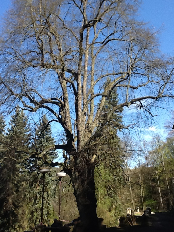 Starý strom v Zámeckém parku Kyselka 3